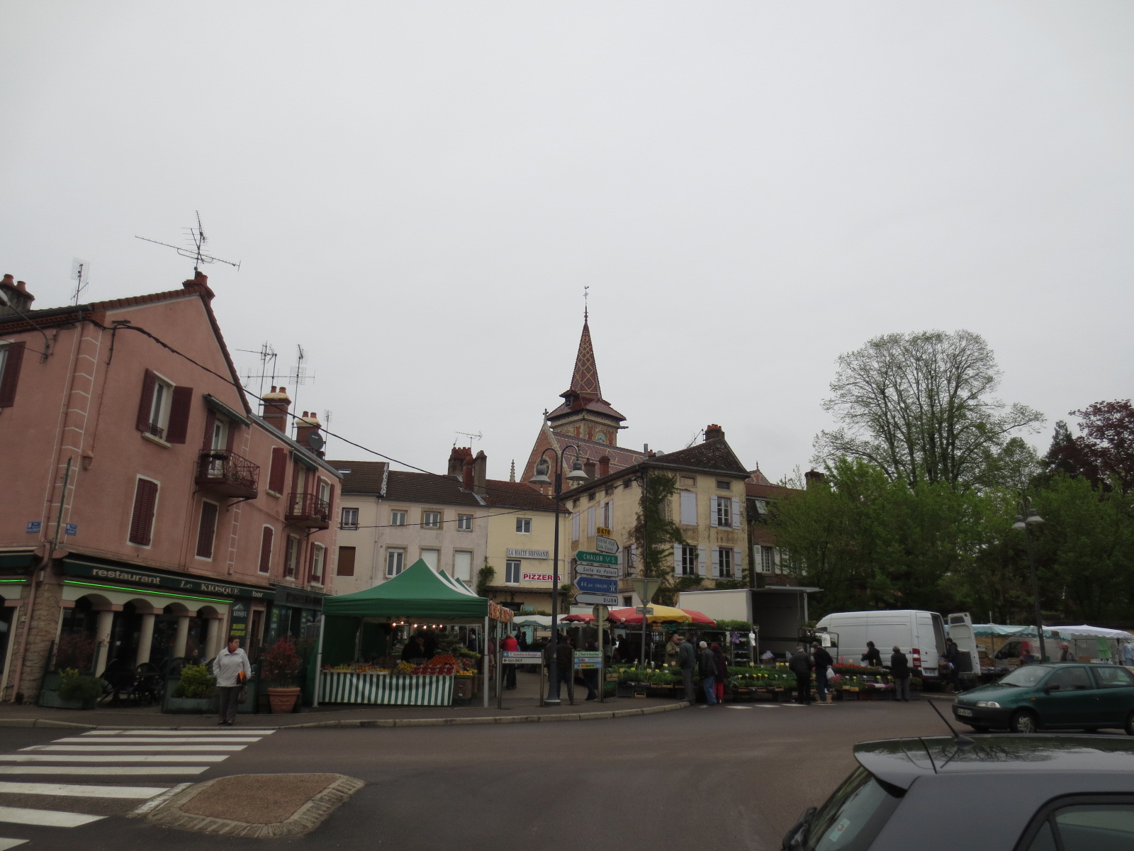 Markets in Louhans